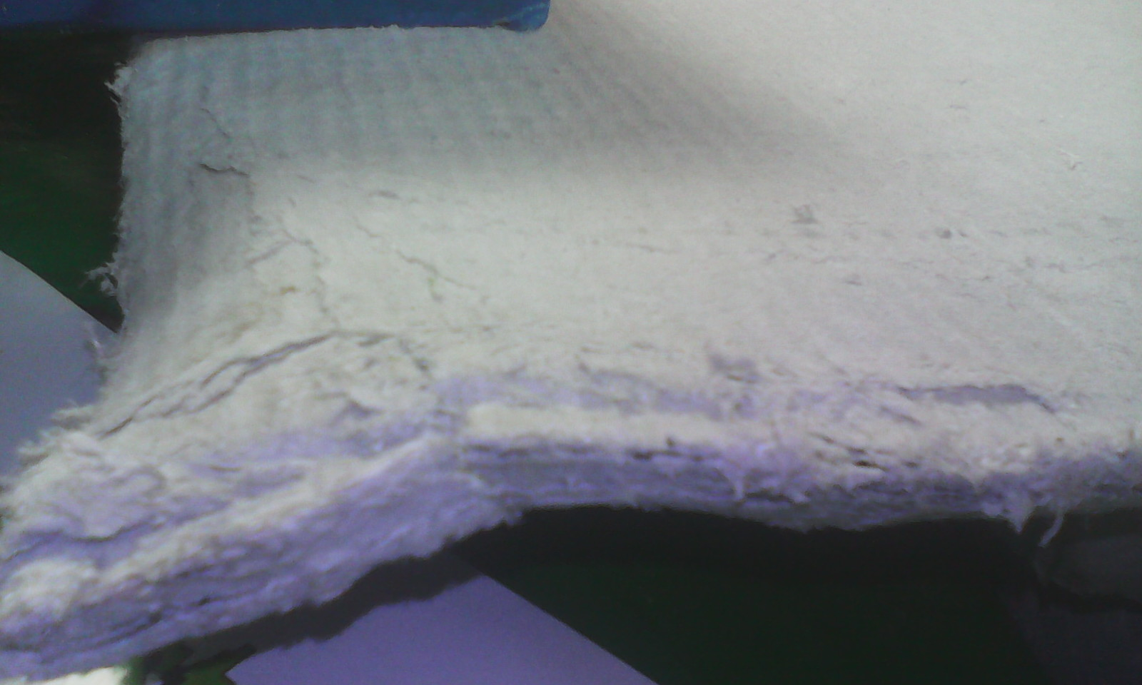 Асбокартон. Россия, Свердловская область. Угол листа расслоённый.